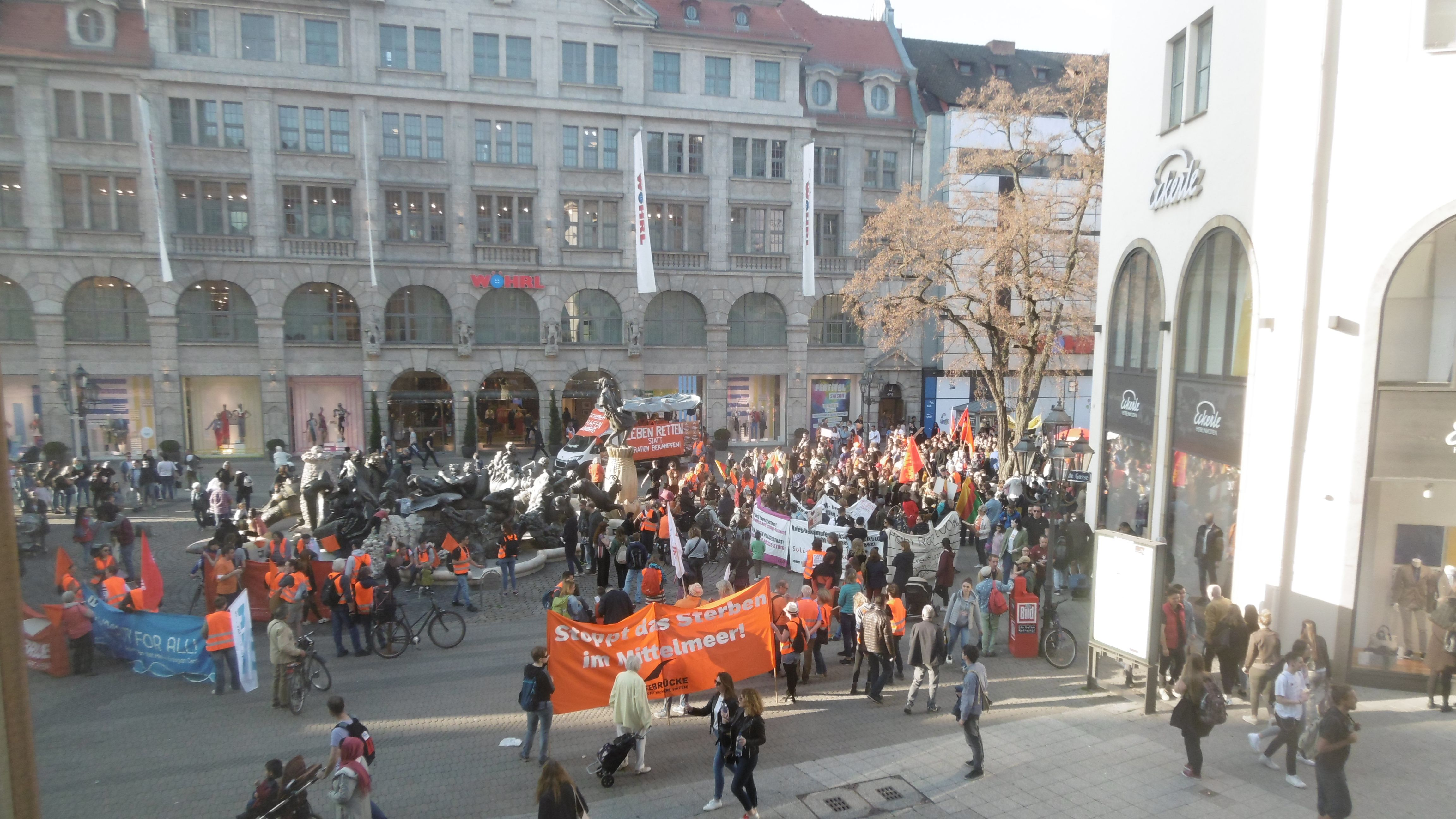 Demonstration in Nürnberg mit 700 Teilnehmern